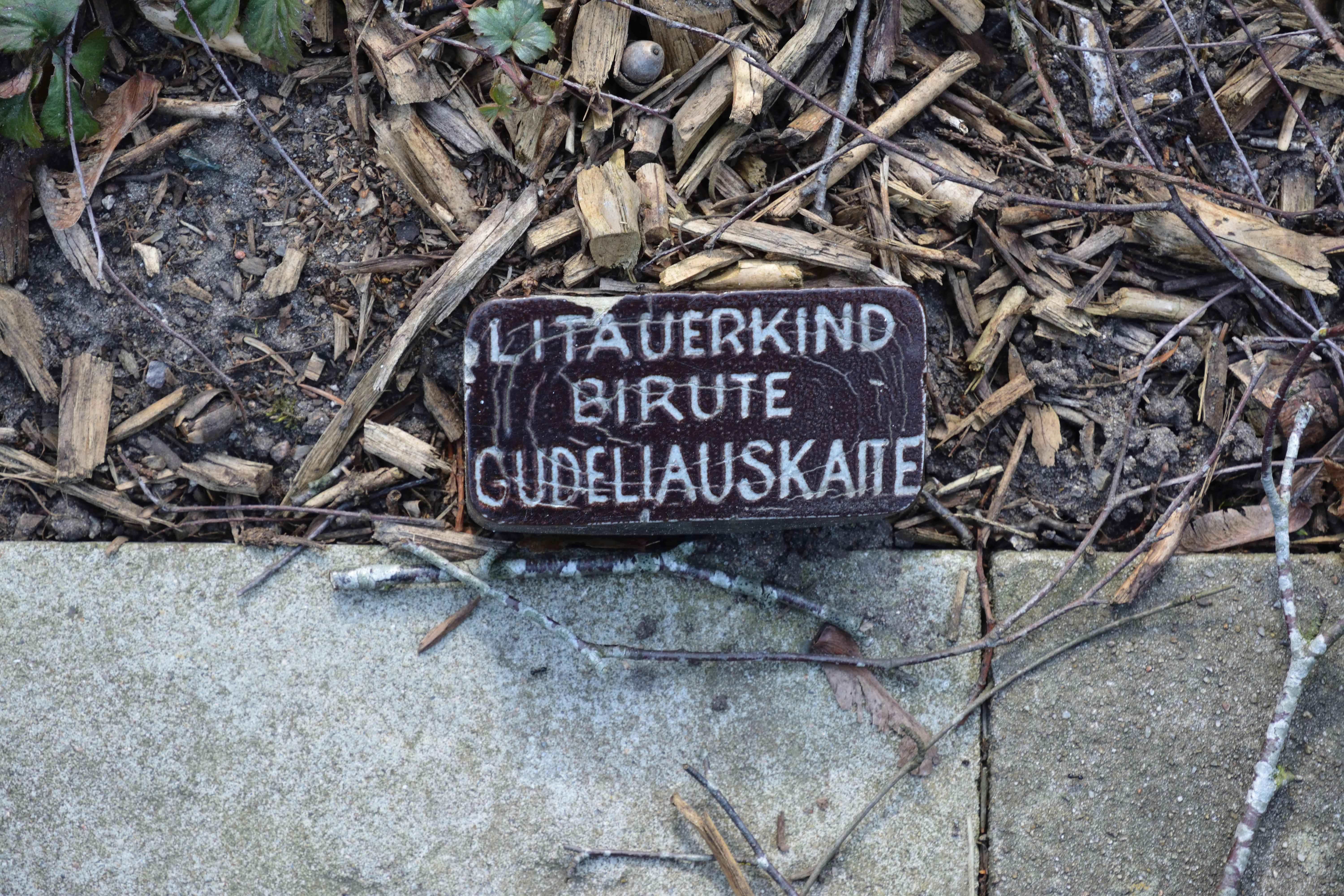 Bilder vom Nordfriedhof in Neumünster